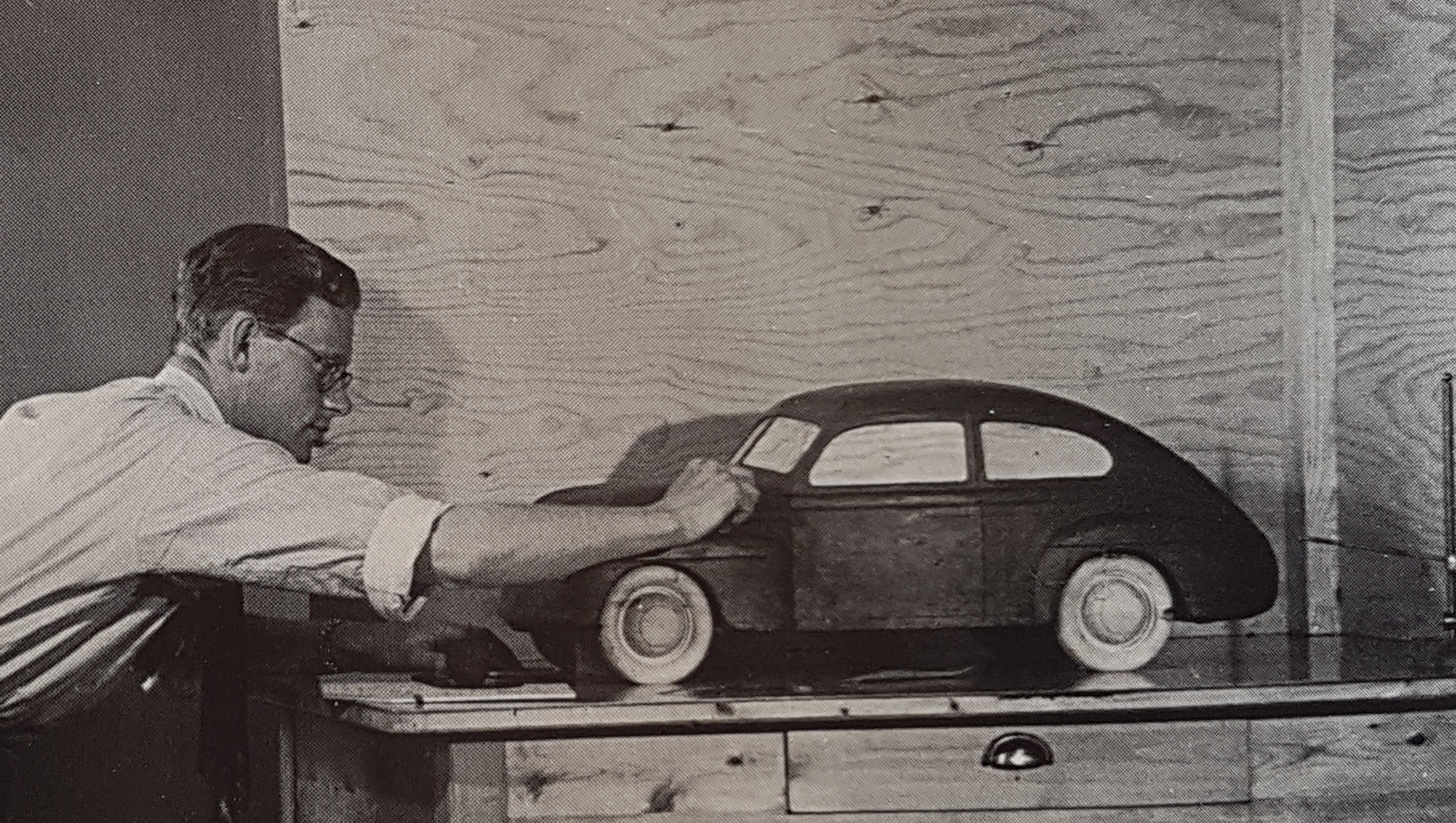 Fotografi av Erik Skoog avfotograferat från rn bok